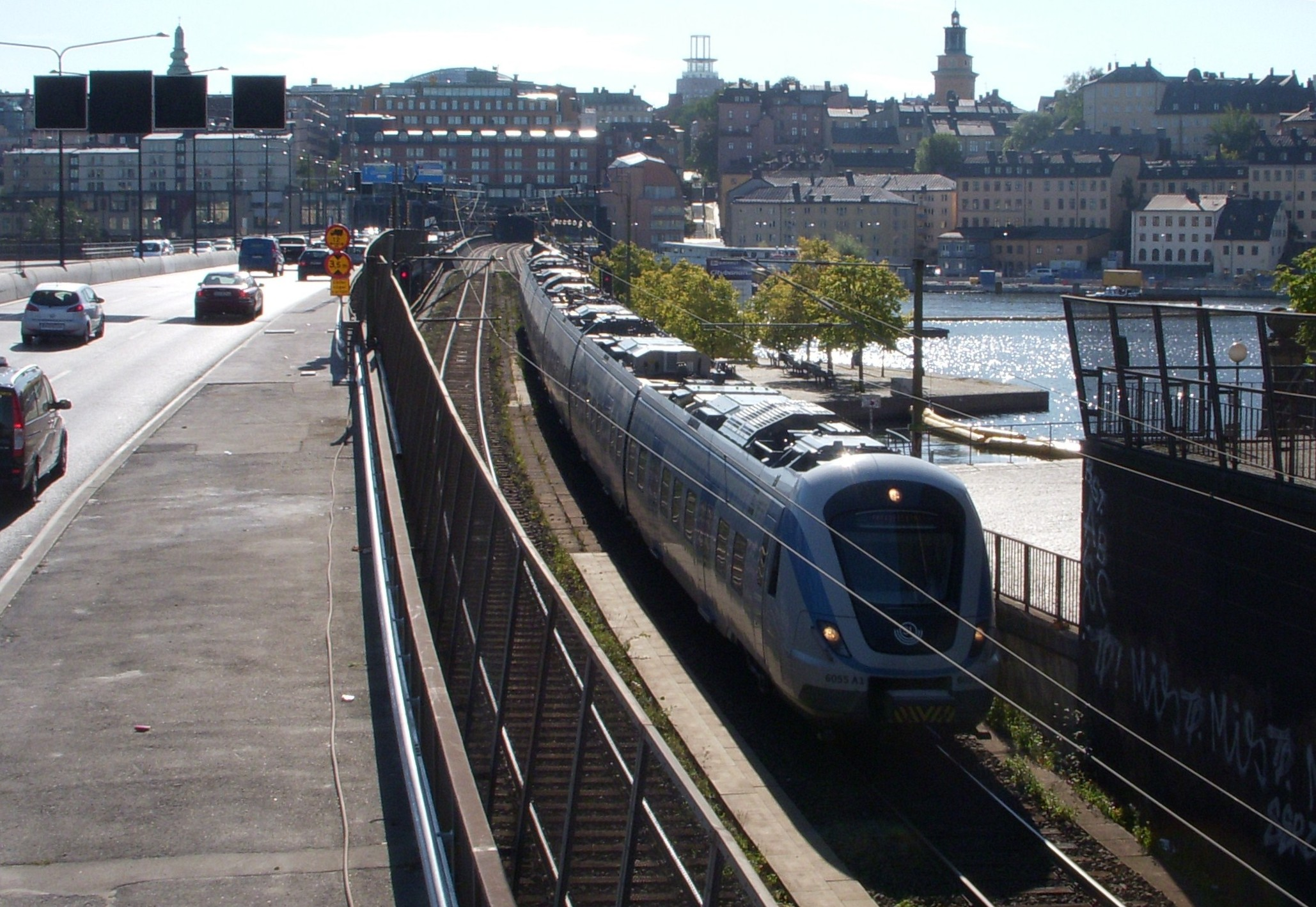 Ett pendeltåg kör norrut på Centralbron i Stockholm